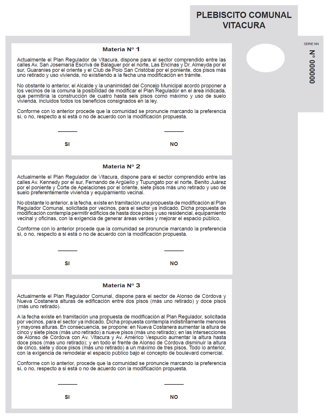 Reproducción de la cédula de votación utilizada en el plebiscito comunal de Vitacura de 2009.